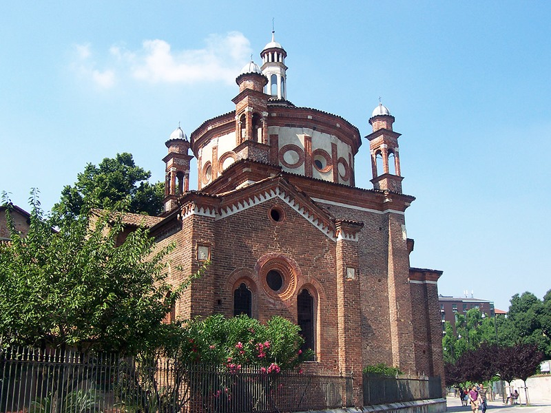 Milano - Cappella Portinari (Basilica di S. Eustorgio)